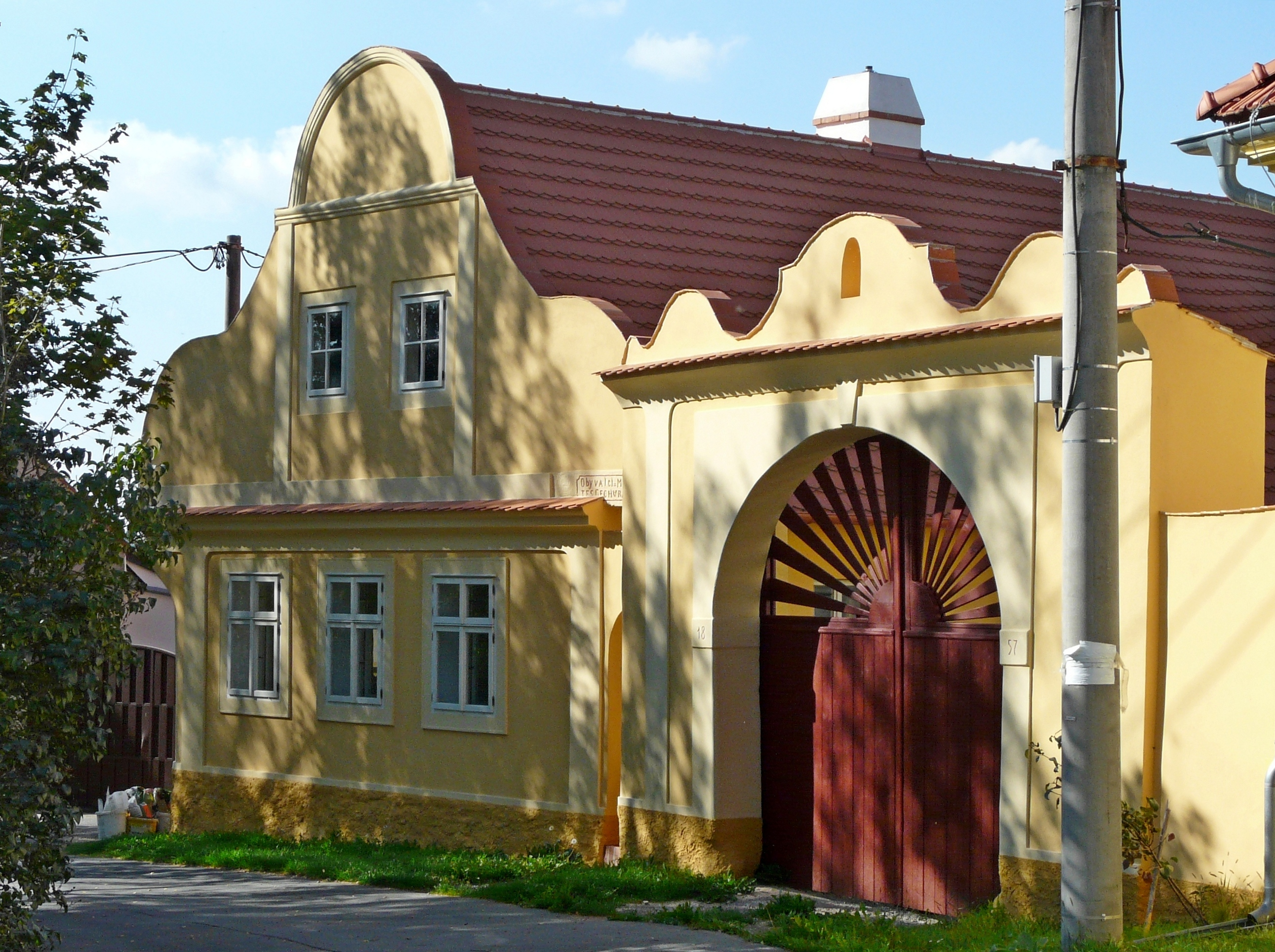 Venkovská usedlost (Černice), Selská náves 15/8, Černice